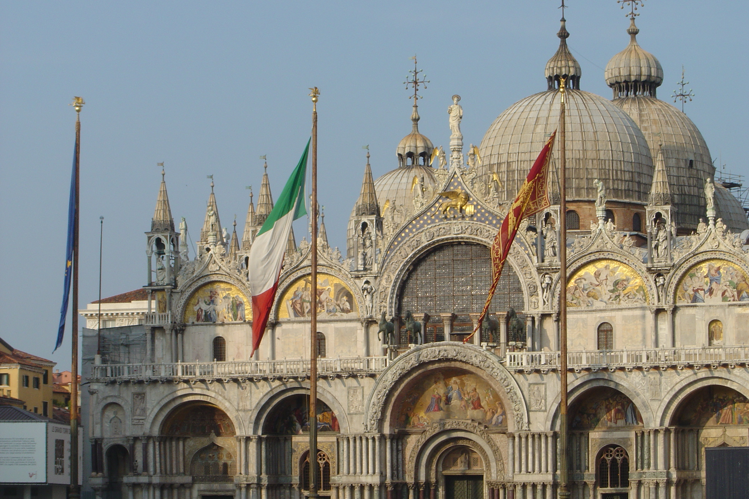 Basilique Saint-Marc à Venise